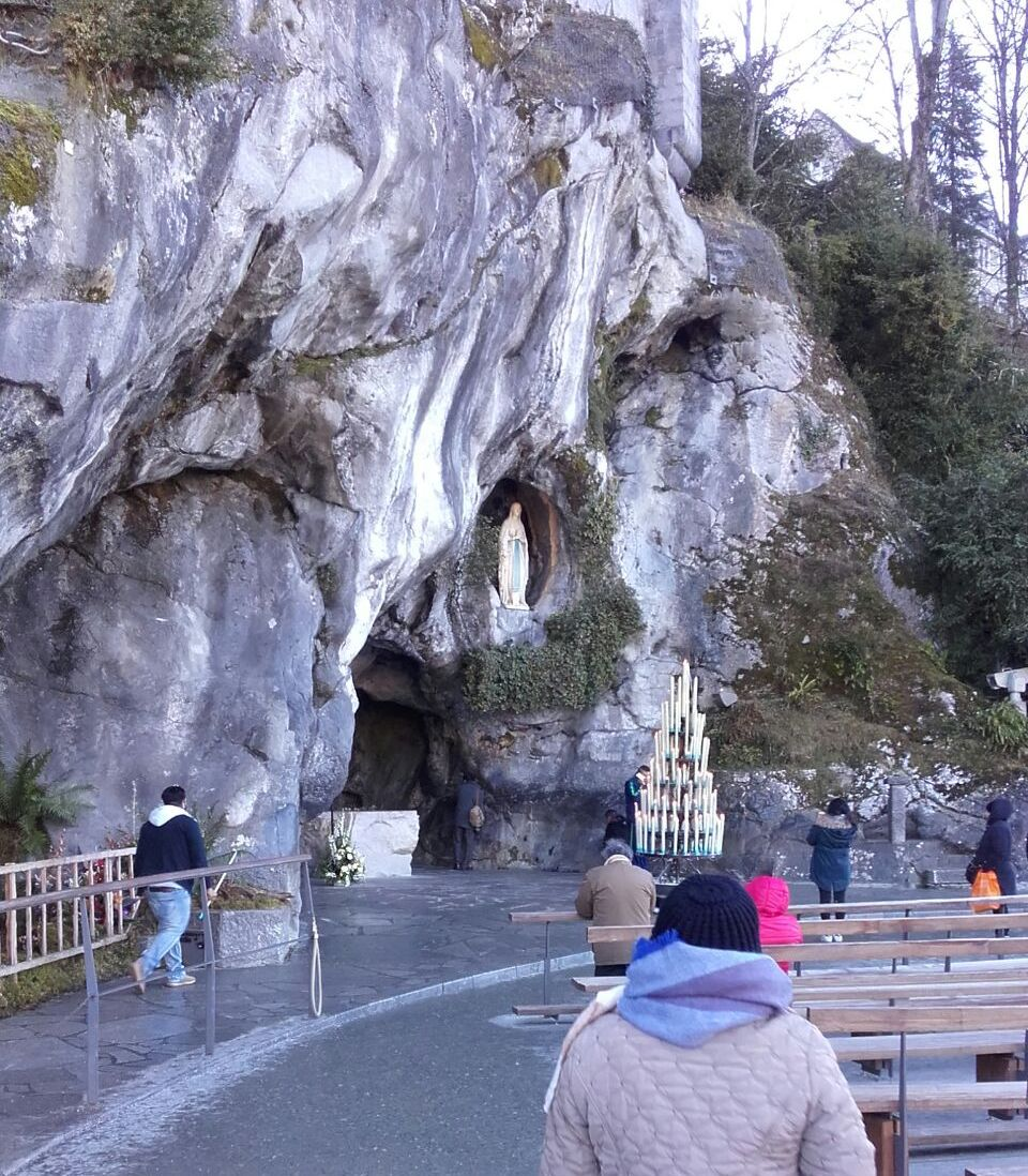 Vista general de la gruta de la Virgen de Lourdes.